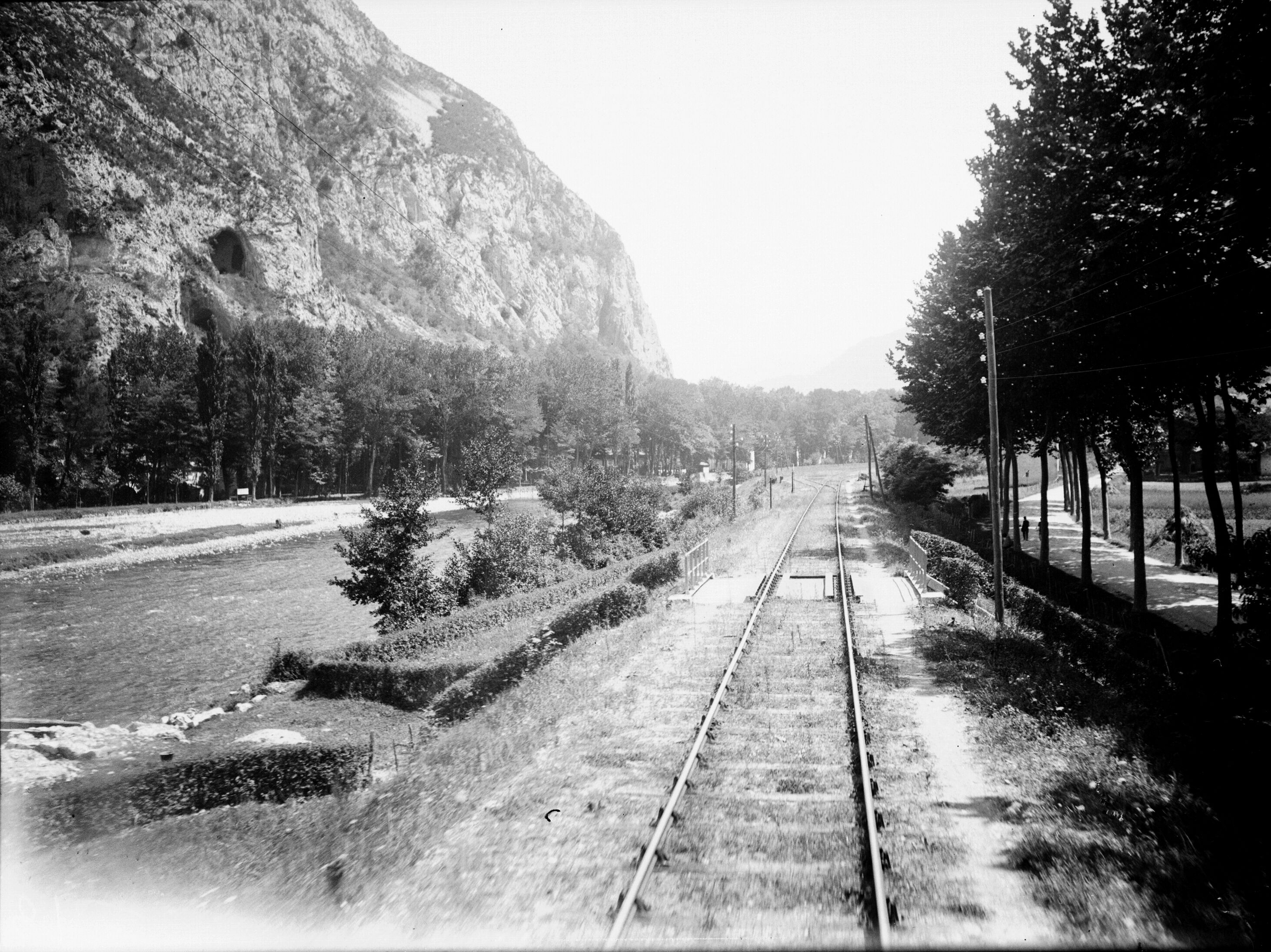 Fonds Trutat - Photographie ancienne Cote : TRU C 384 Localisation : Fonds ancien Original non communicable Titre : En marche vers Ussat, Ax-les-Thermes, 5 août 1906 Auteur : Trutat, Eugène Rôle de l’auteur : Photographe Lieu de création : Ax-les-Thermes (Ariège ; canton) Date de création : : 1906 Mesures : 12 x 9 cm Mot(s)-clé(s) : -- Montagne -- Cours d'eau -- Train -- Voie ferrée -- Végétation -- Arbre -- Platane -- Route -- Pyrénées (France) -- Ussat (Ariège) -- Tarascon-sur-Ariège (Ariège ; canton) -- Ariège (France ; haute vallée) -- 20e siècle, 1e quart Médium : Photographies Médium : Positifs sur plaque de verre -- Noir et blanc -- Paysages Bibliographie : Lévy (André). - Le dictionnaire des Pyrénées : encyclopédie illustrée. - Toulouse : Privat, 1999. - 922 p ; 32 cm. cf. p.840-841 Bibliothèque de Toulouse. Domaine public